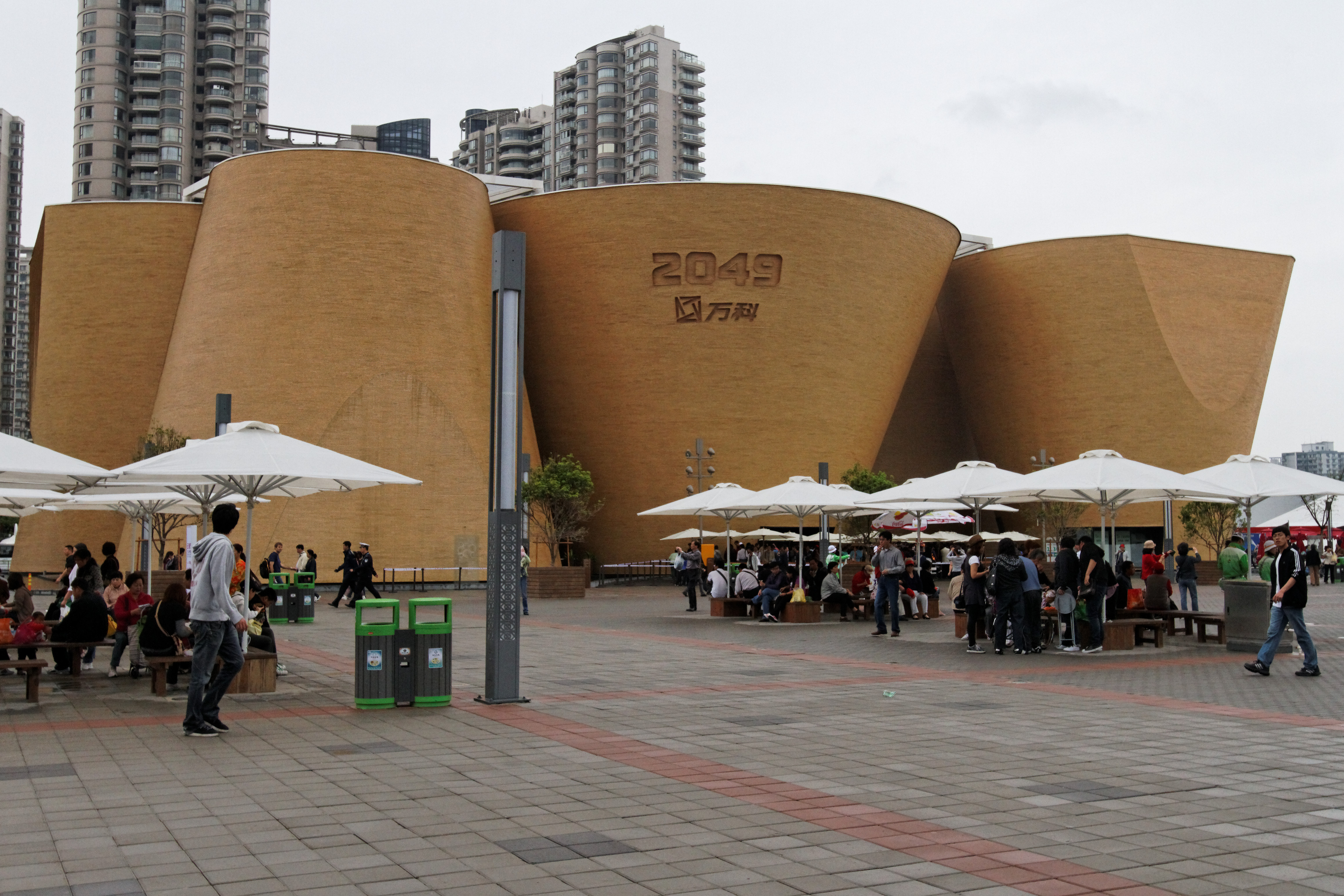 Wanke Pavilion 2049, Expo 2010